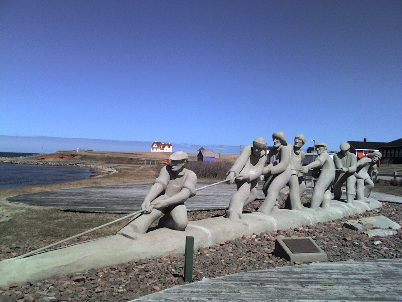 ファイルの概要 Statue of seamen, Îles de la Madeleine. By (WT-shared) ぐら(gura), 2007